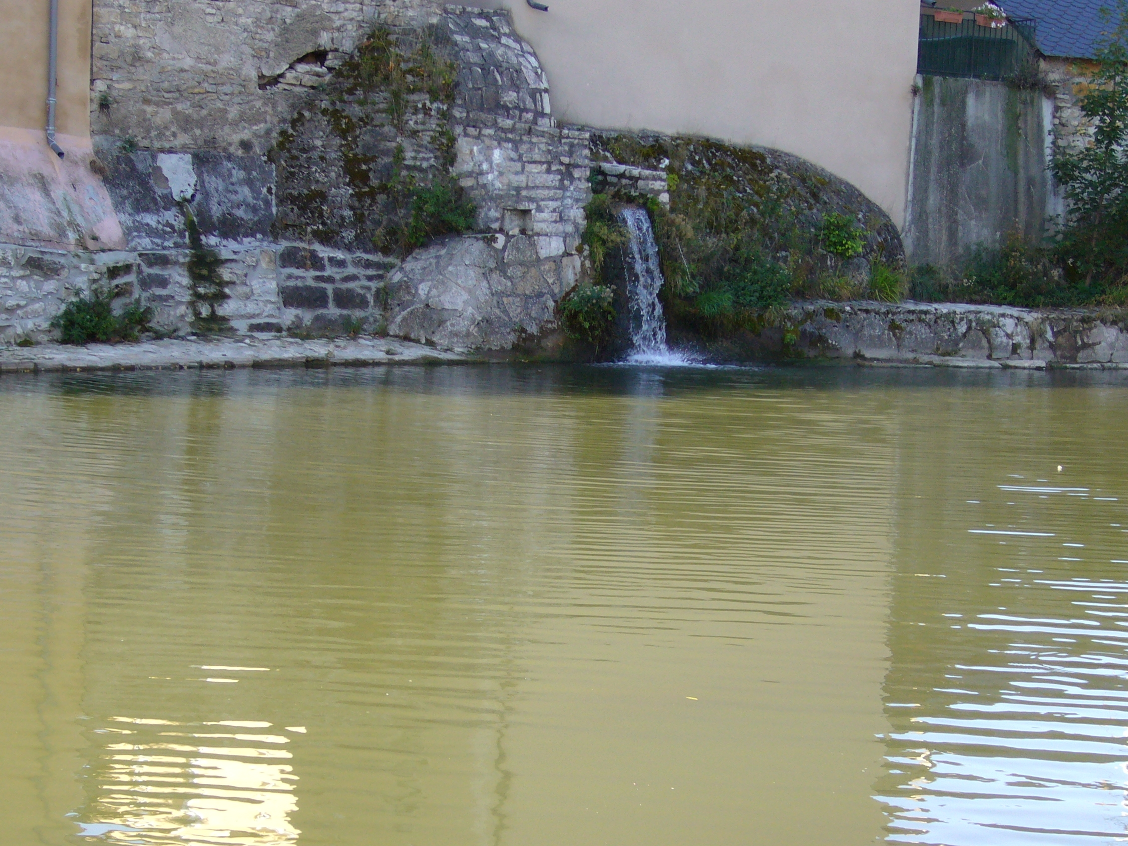 Le Lot à Mende, Lozère, France